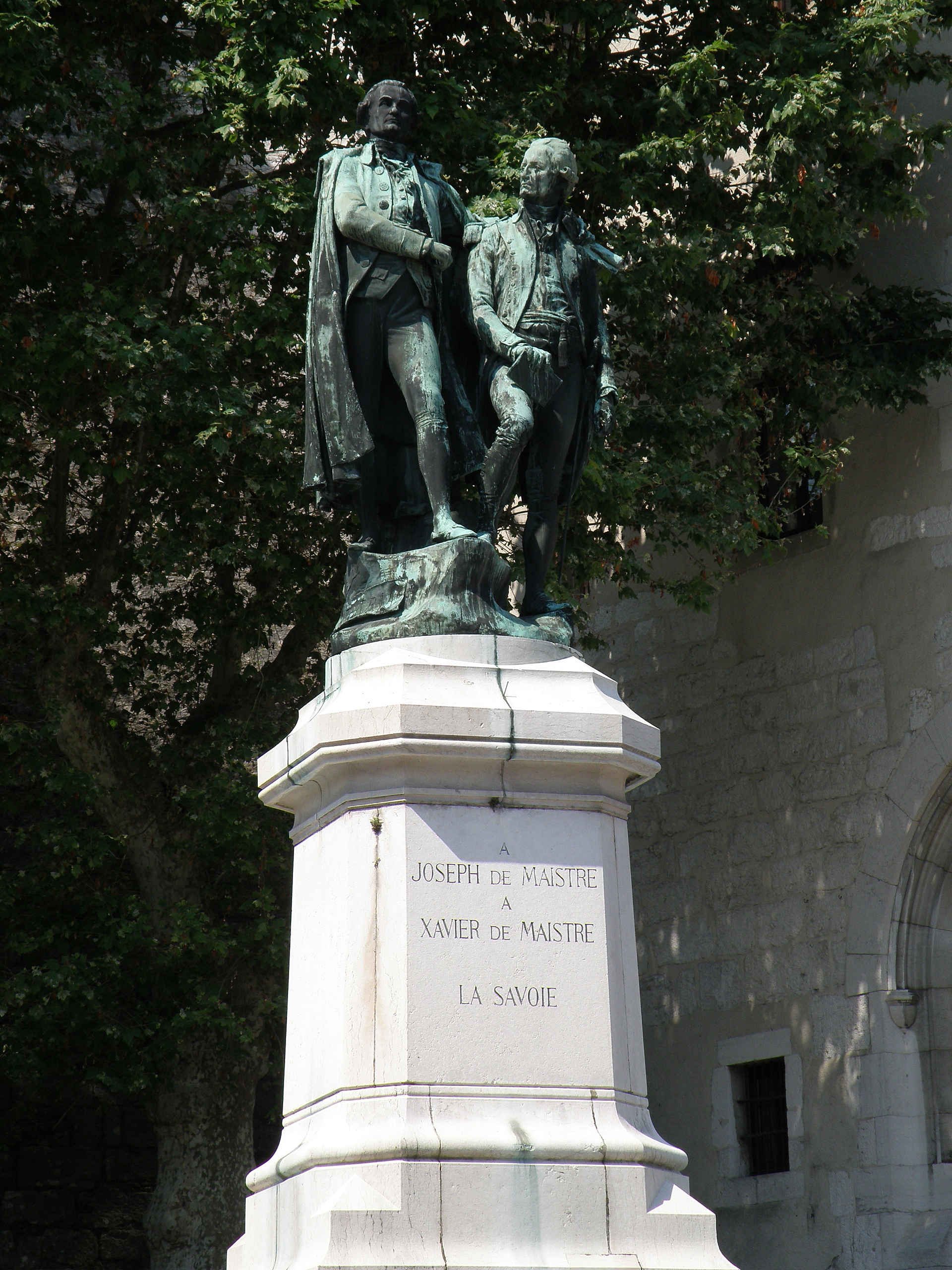 Chambéry, ville et préfecture du département de la Savoie (région Rhône-Alpes, France). Place du Château, statue de Xavier et Joseph de Maistre.